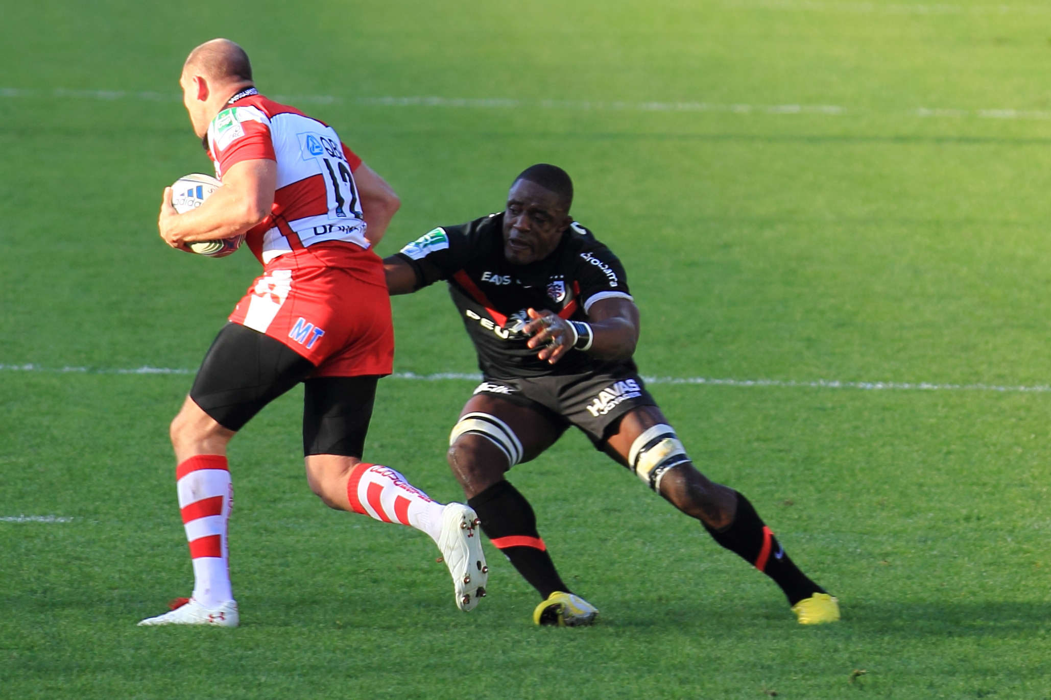 Heineken Cup — 13 November 2011, Stade Ernest Wallon. Match between: Stade toulousain — Gloucester Rugby